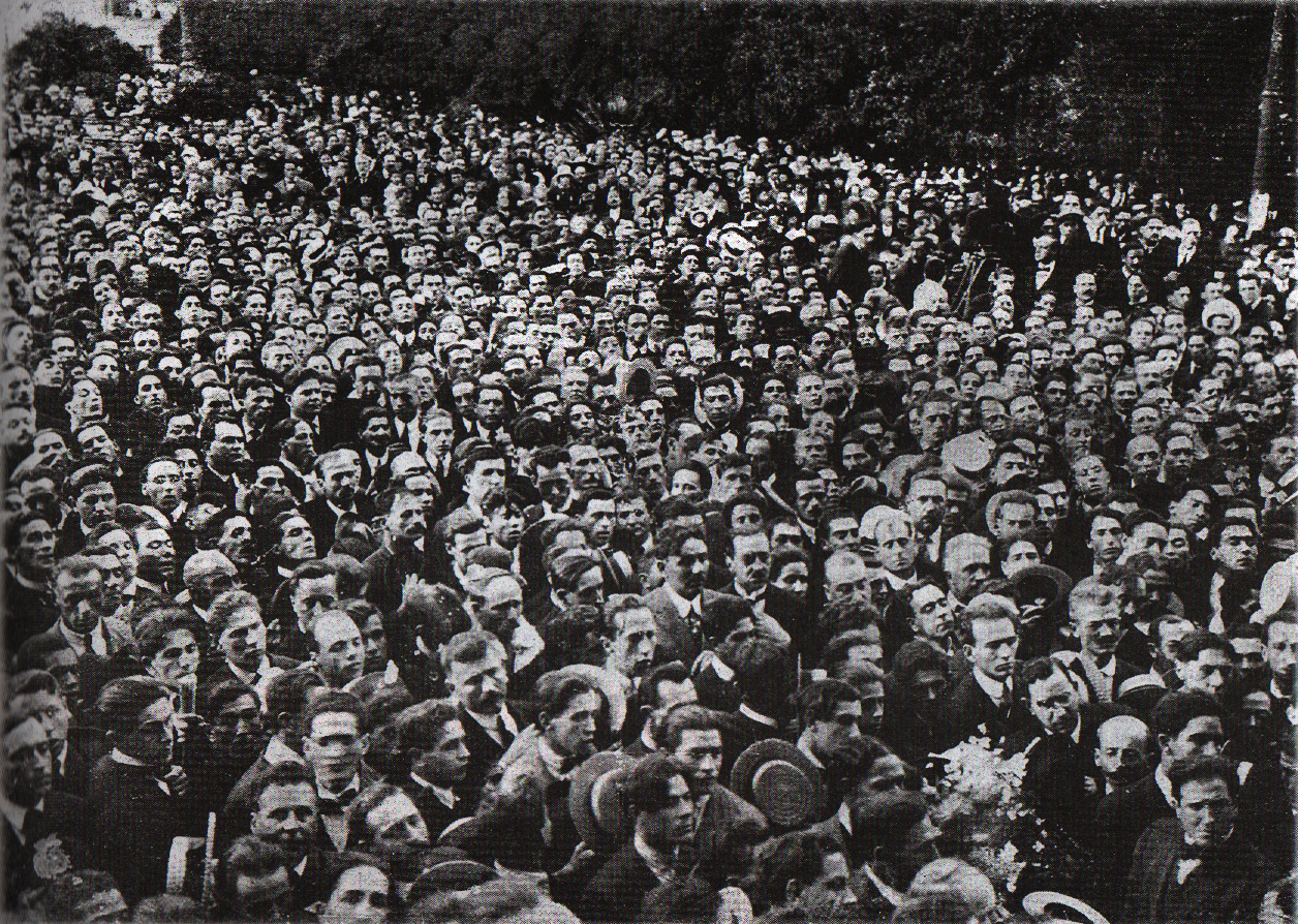 Cortejo fúnebre de Washington Beltrán Barbat (1885 - 1920), político y abogado uruguayo.